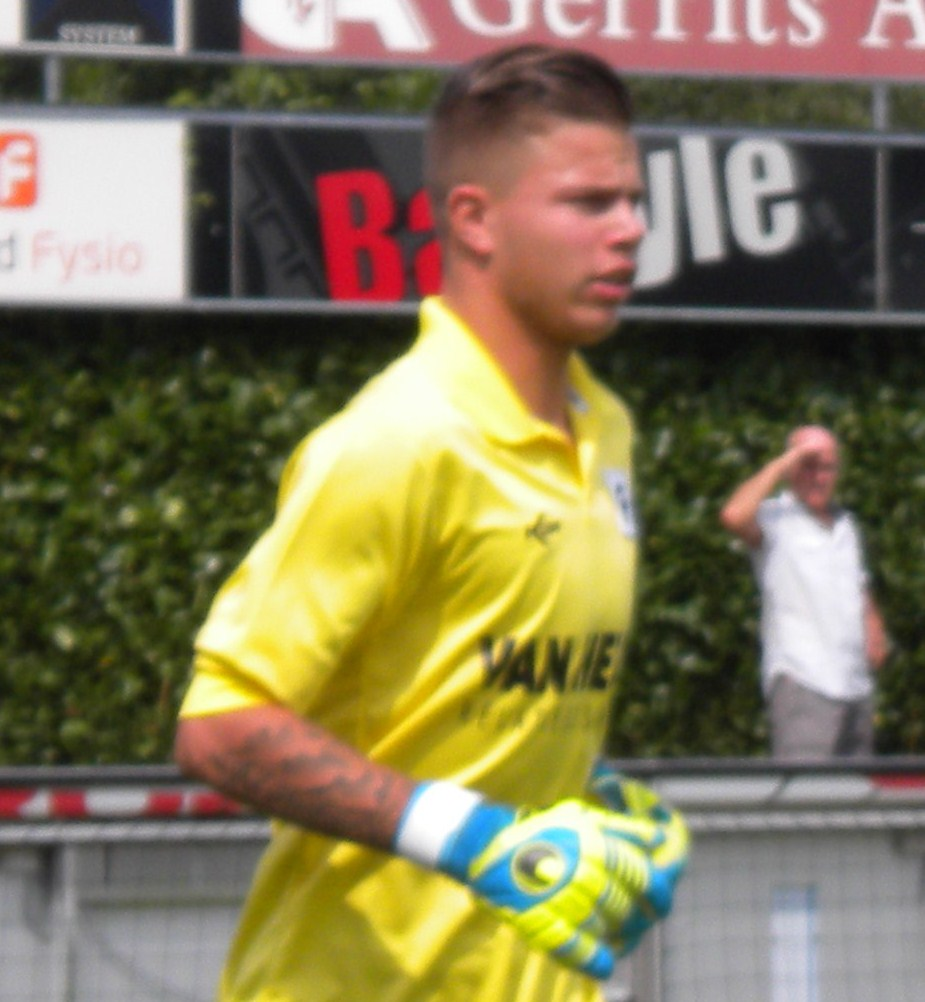 Simon van Beers in een vriendschappelijk duel met JVC Cuijk.